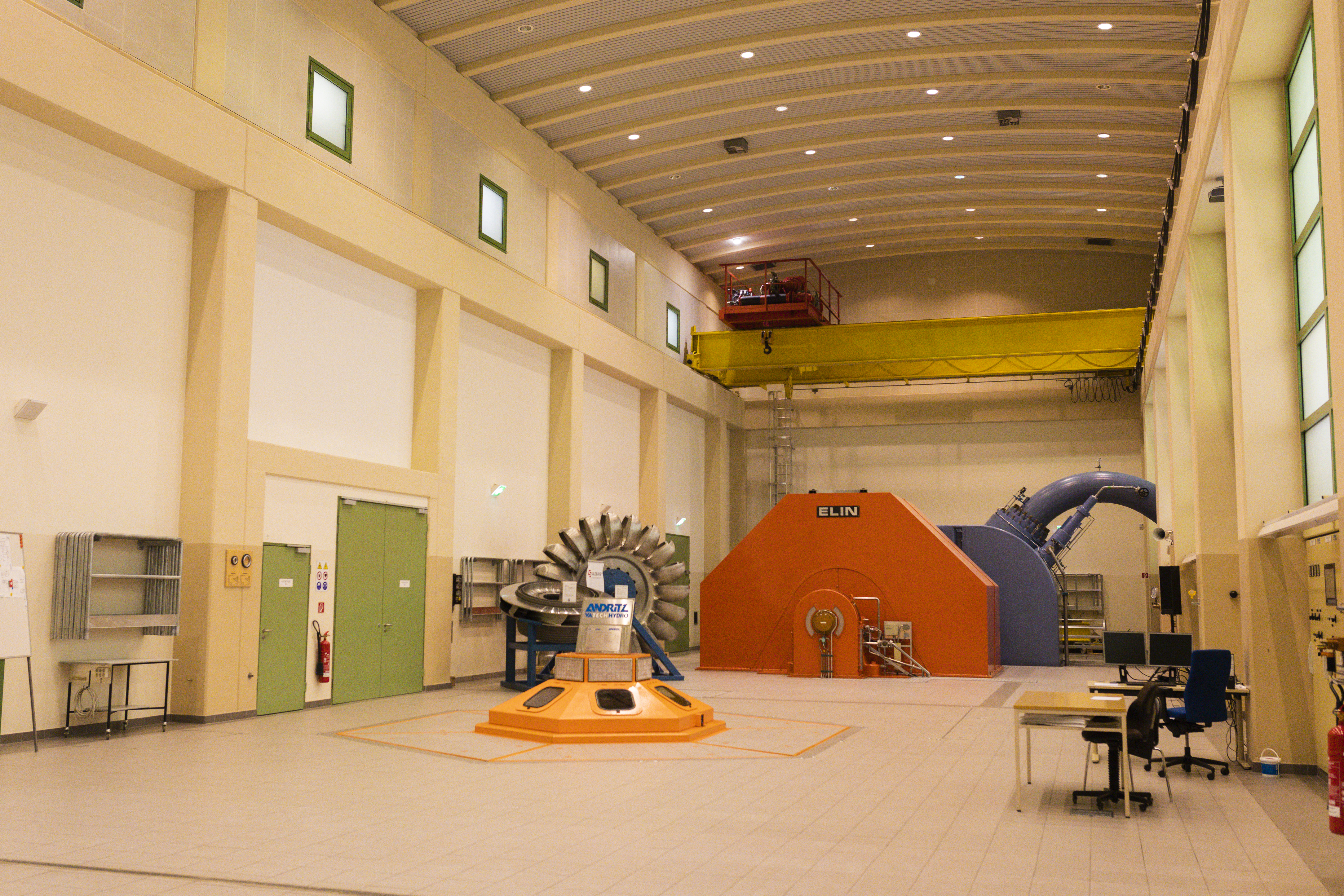 Kraftwerk Muhrfall, Muhr, Austria